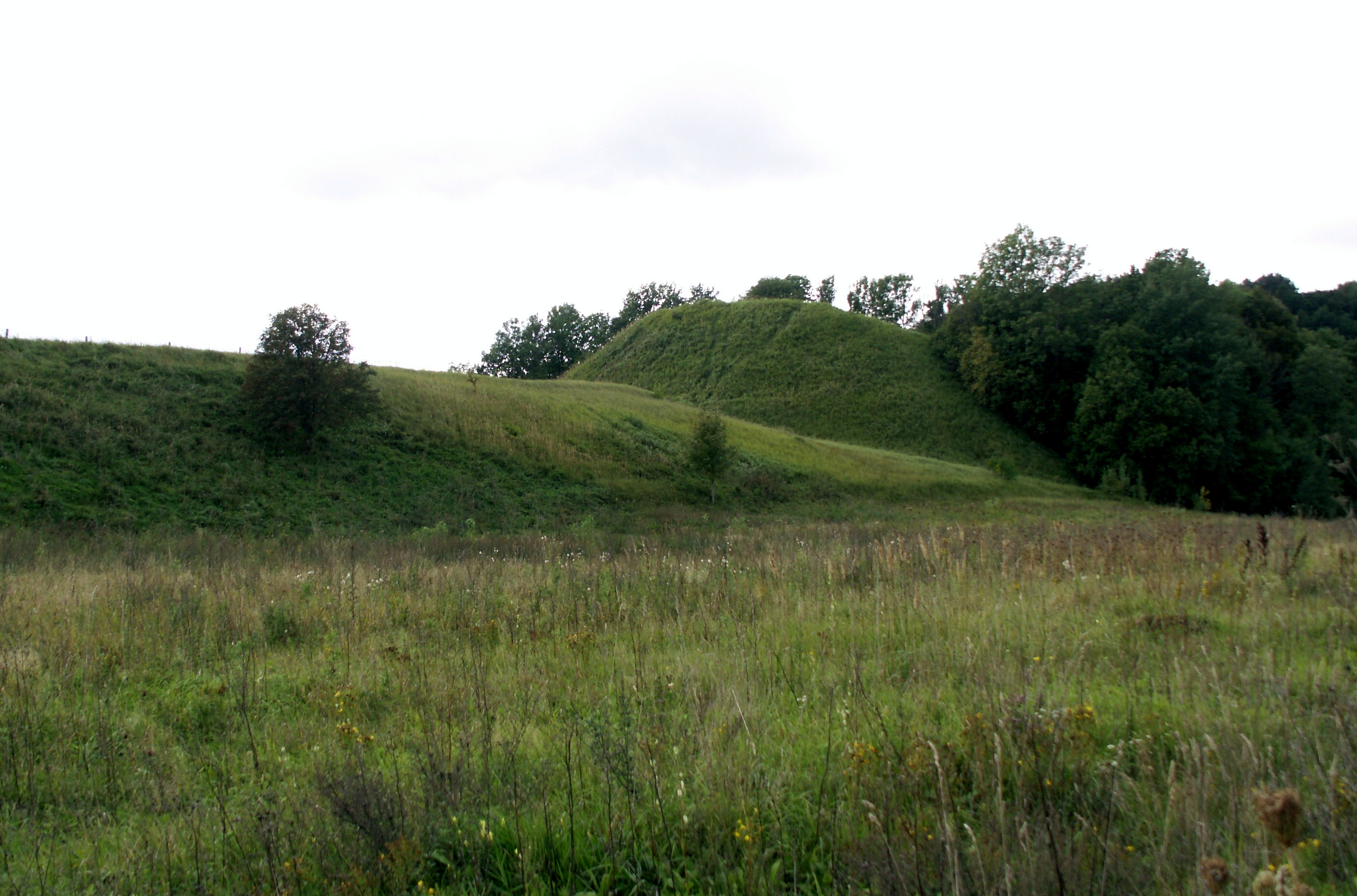 Inčėnų, Duobės piliakalnis, Vytinių pagastas, Latvija